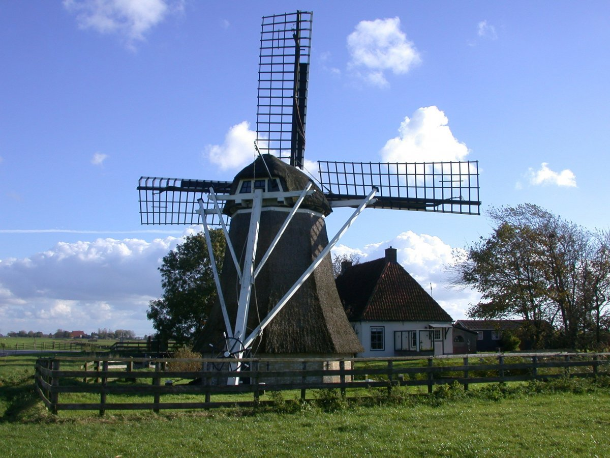 Kingmatille/ Ten-Bruggencatenummer: 12268: Achtkante grondzeiler van achteren gefotografeerd (opmerking: Foto gemaakt in het kader van het project Actualisering Monumentenregister (AMR).)